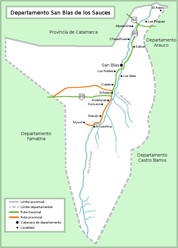 Esquema de las localidades del departamento San Blas de los Sauces, en la provincia de La Rioja, Argentina. Fuente Dirección General de Estadística y Sistemas de Información – La Rioja – Septiembre 2013